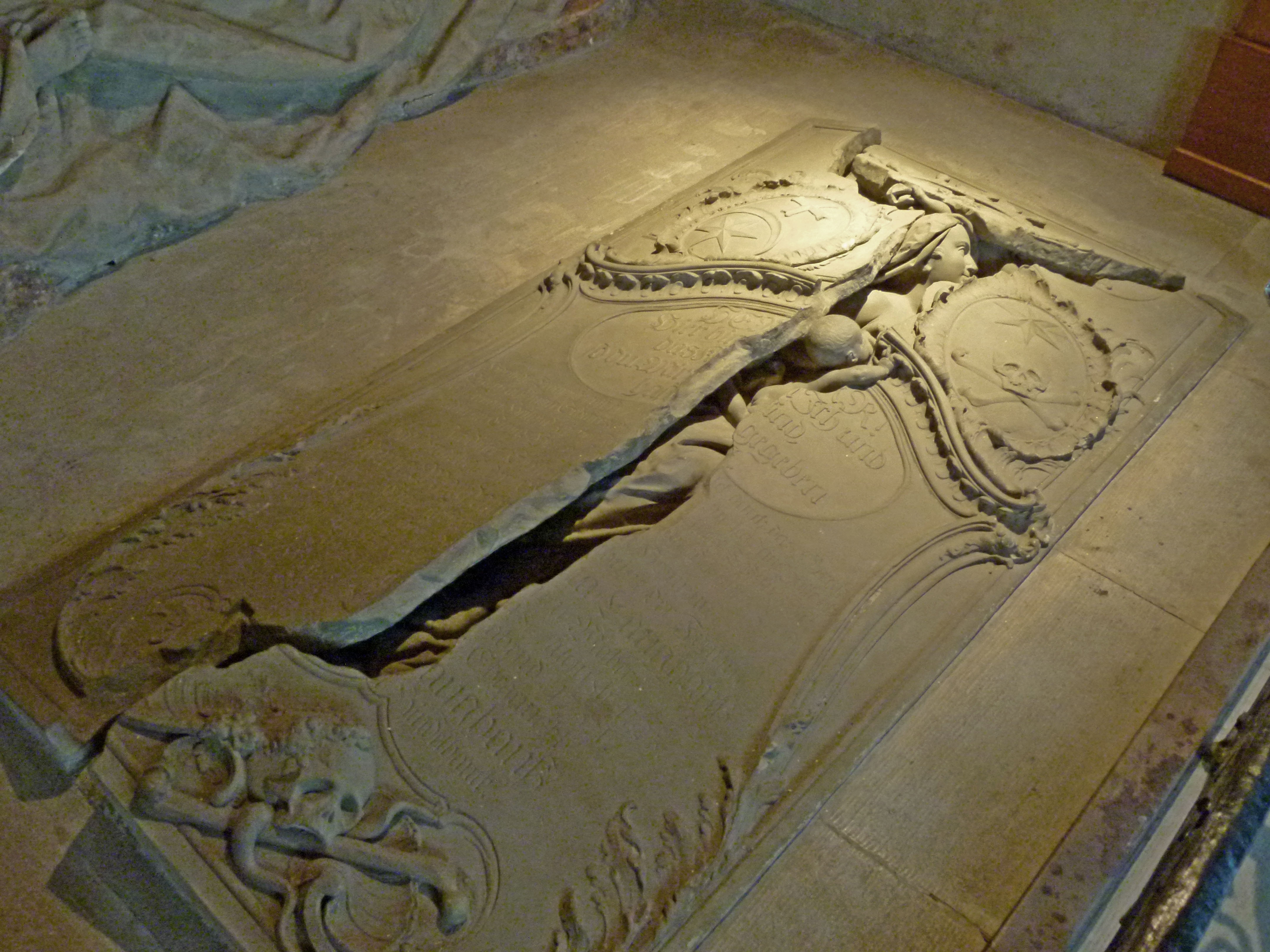 Grabmal der Pfarrersfrau Maria Magdalena Langhans und ihrem Kind, gest.1751. Inschrift: "Hier bin ich und das Kind, so du mir gegeben hast" und von Albrecht Haller: "Horch! Die Trompete ruft, sie schallet durch das Grab / Wach auf, mein Schmerzenskind, leg deine Hülle ab / Eil deinem Heiland zu, vor ihm flieht Tod und Zeit / Und in ewig Heil verschwindet alles Leid". Bildhauer: Johann August Nahl der Ältere